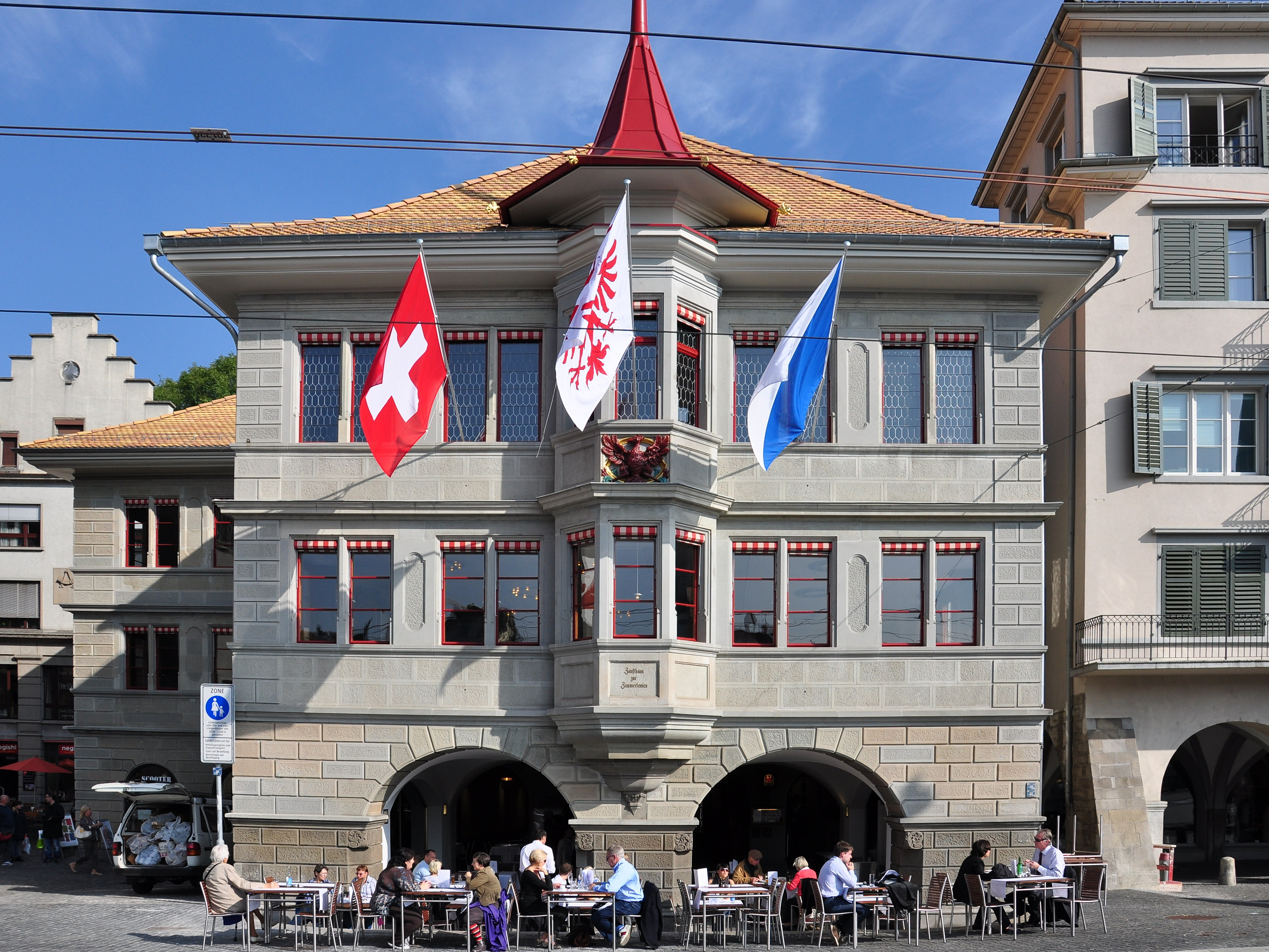 Zunfthaus zur Zimmerleuten – rebuilt and newly inaugurated in October 2010 – at Limmatquai in Zürich (Switzerland)